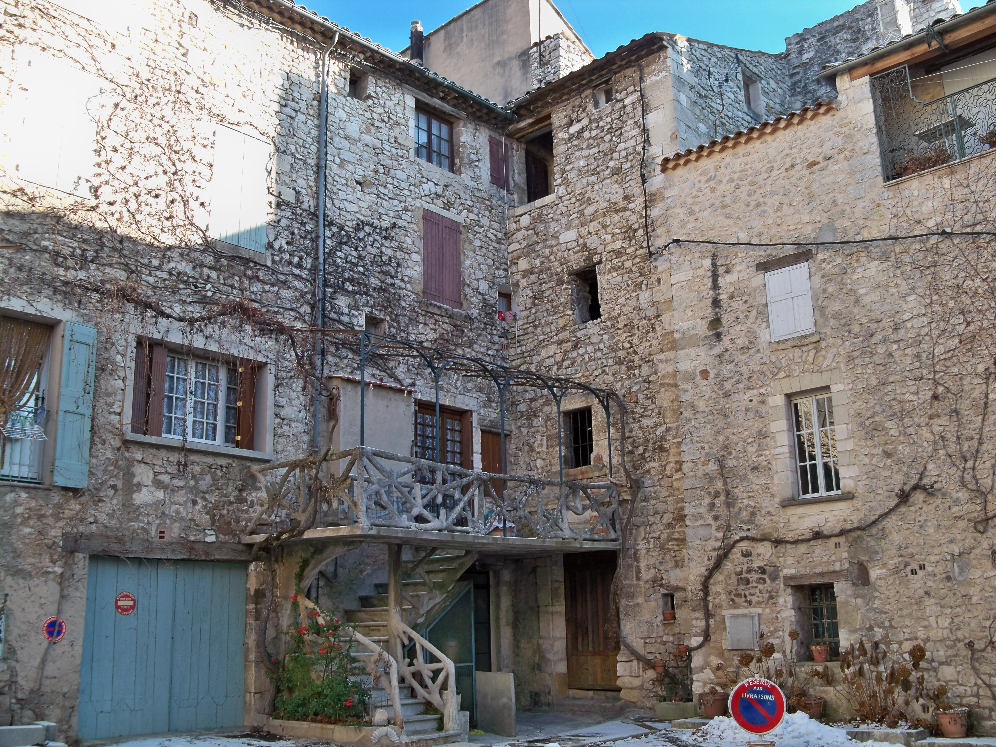 Maison en hauteur à Sault (Vauluse)